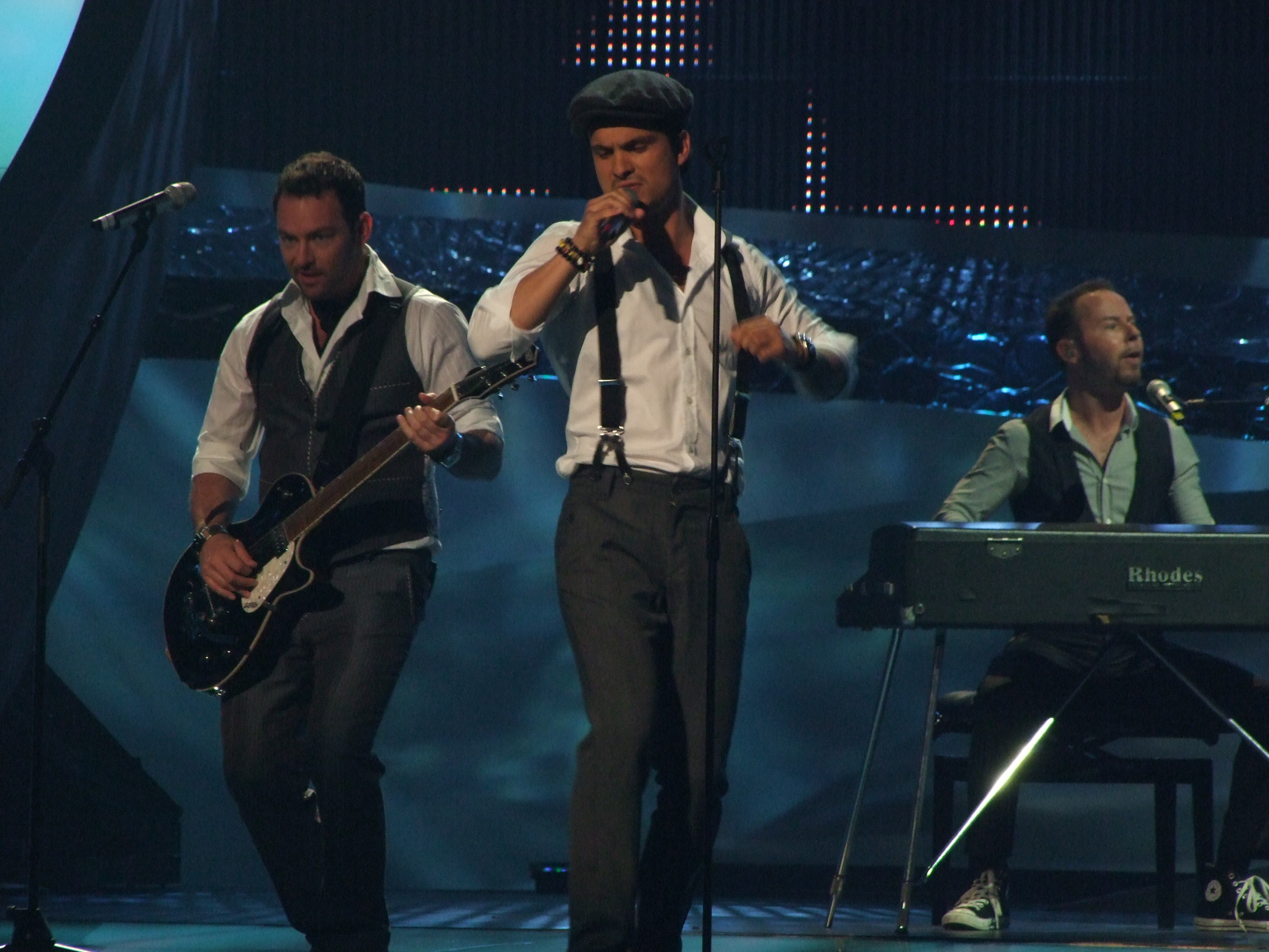 Final Eurovision 2008